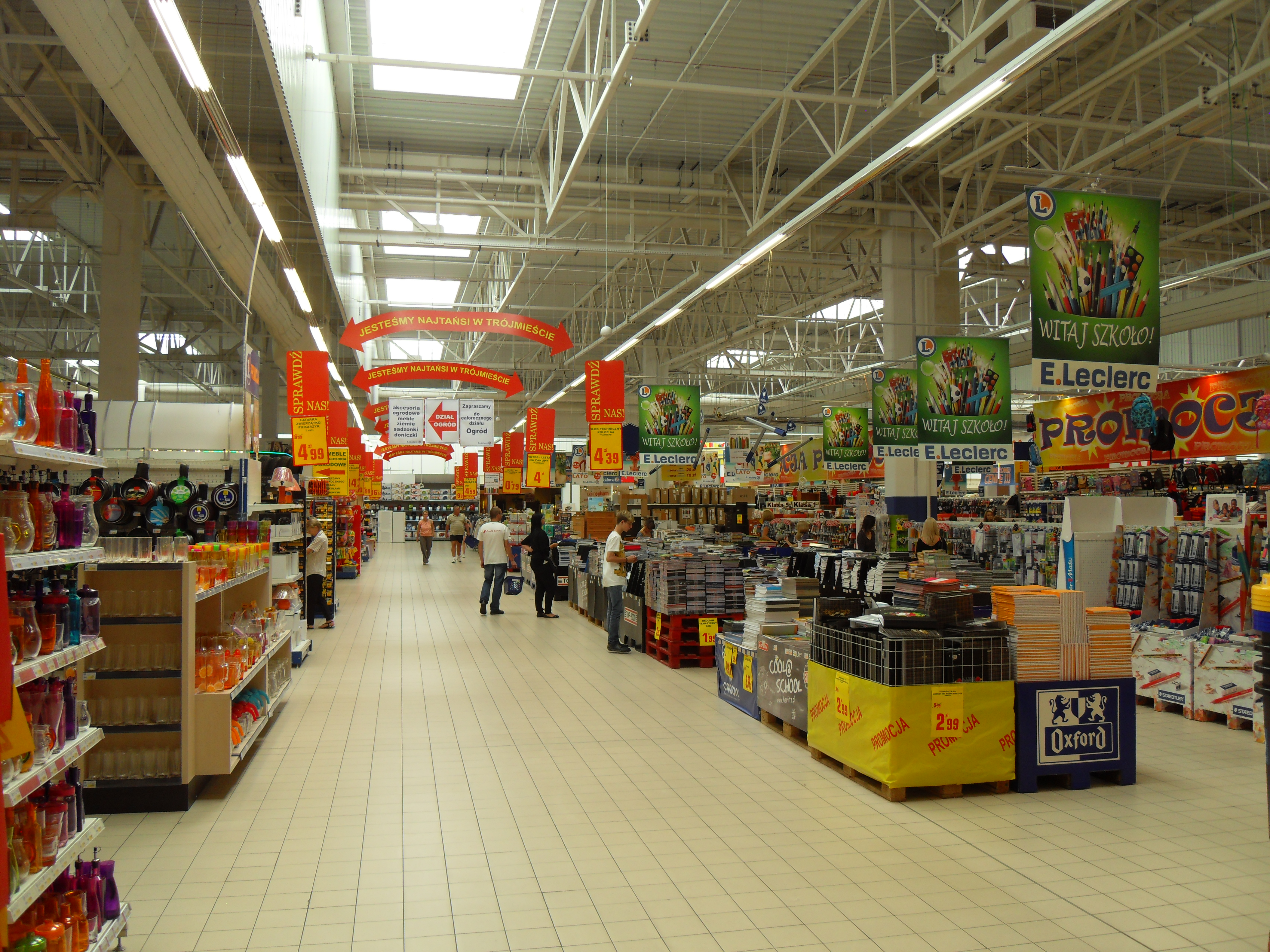 Gdańsk. Galeria Przymorze, E.Leclerc.